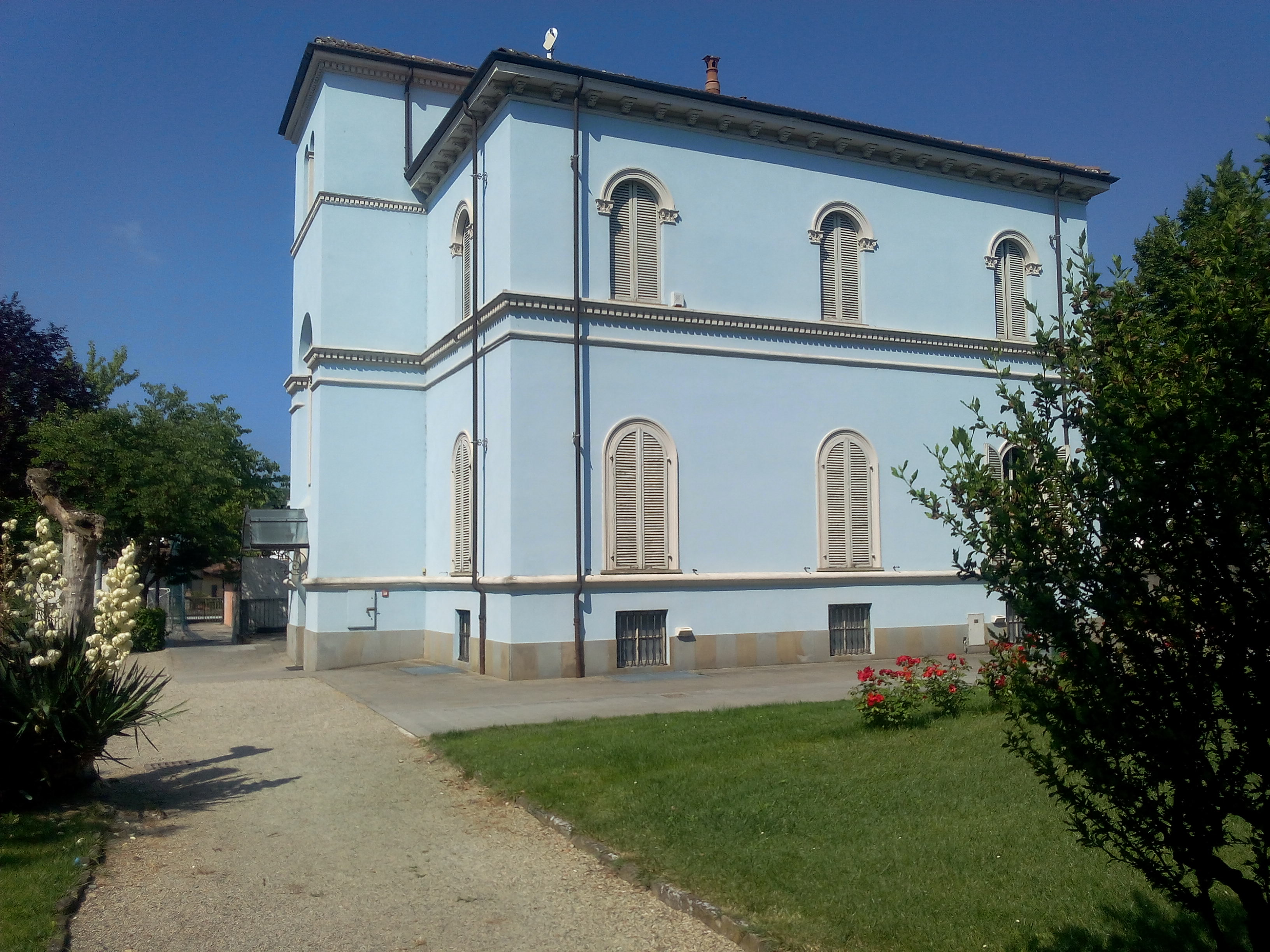 Bubbio (AT): il municipio